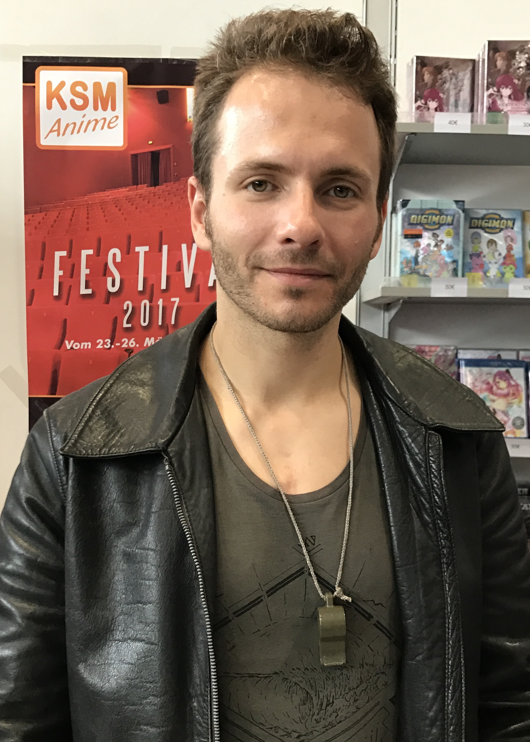 Schauspieler und Synchronsprecher Jacob Weigert bei einer Autogrammstunde auf der Leipziger Buchmesse 2017